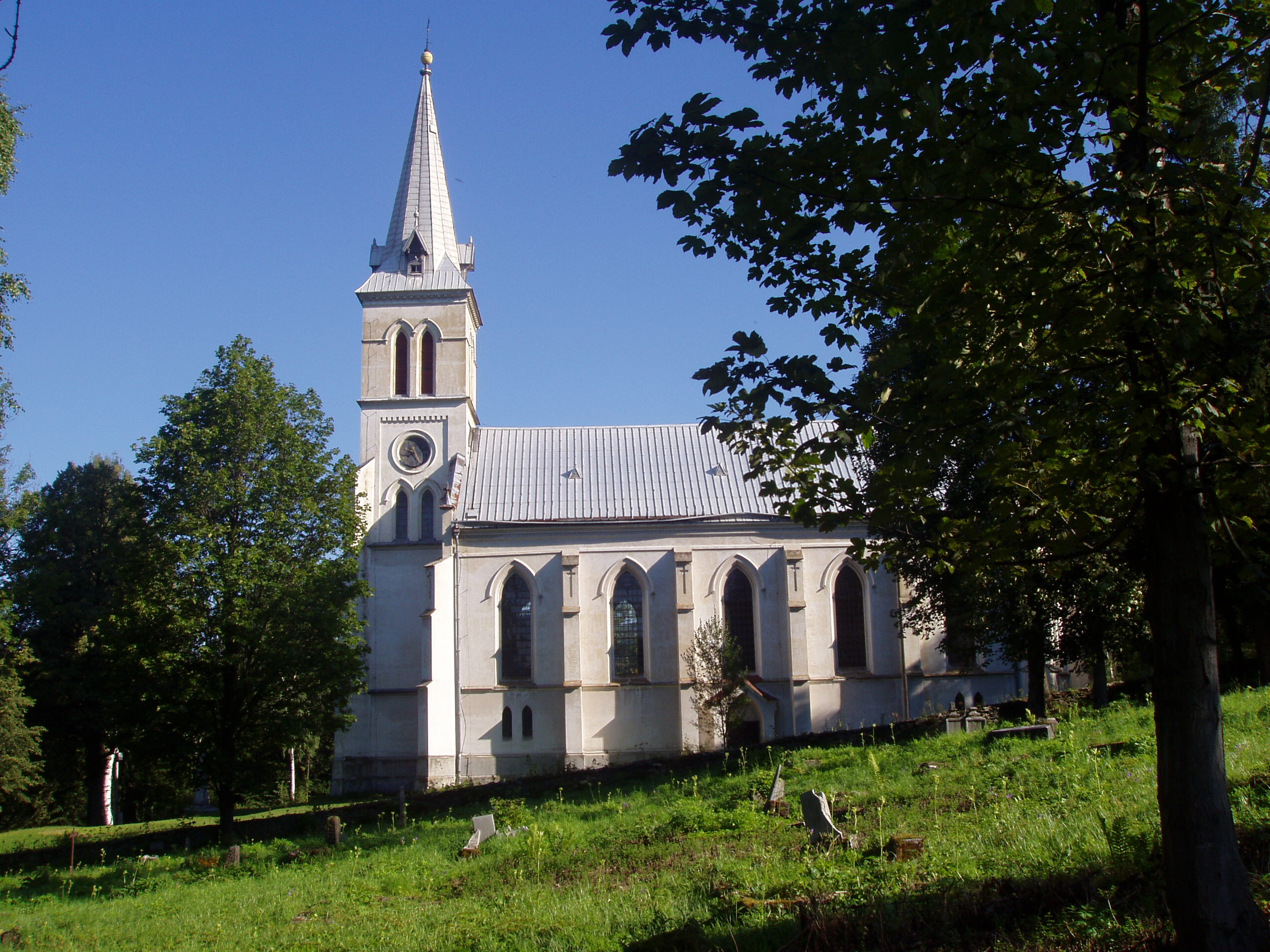 Kostel Navštívení Panny Marie v Mnichově u Vrbna pod Pradědem